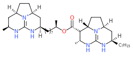 Estructura molecular de la batzelladina F